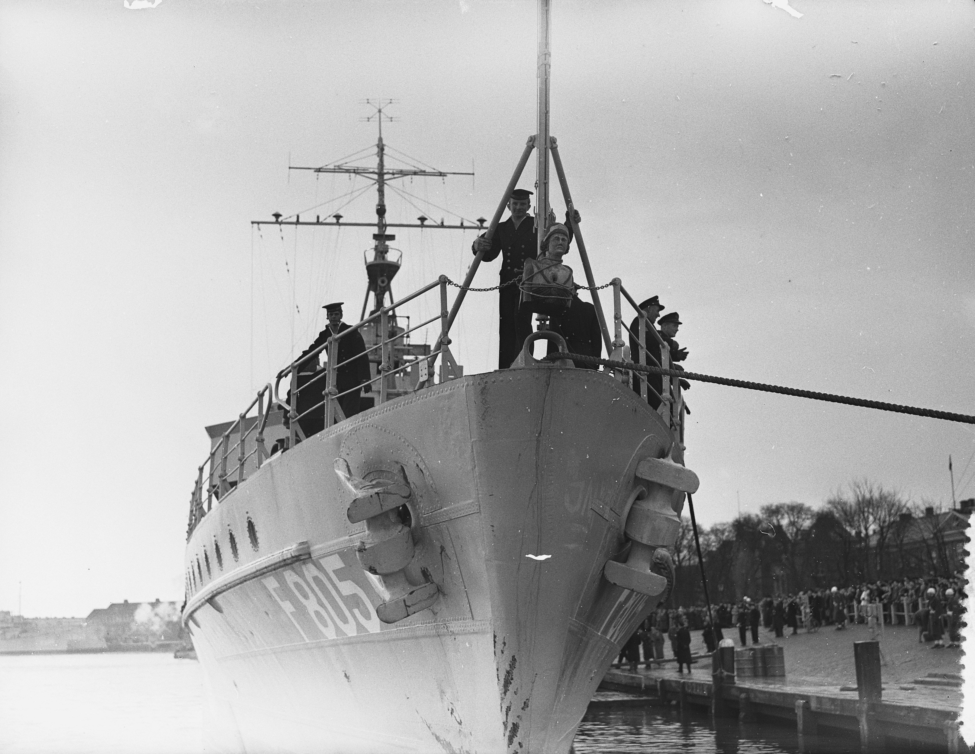 Collectie / Archief : Fotocollectie Anefo Reportage / Serie : [ onbekend ] Beschrijving : Terugkeer uit Nederlandse Antillen Fregat "Van Speijk" , in Den Helder Datum : 13 februari 1955 Locatie : Den Helder, Nederlandse Antillen Persoonsnaam : Fregat 'Van Speijk' Fotograaf : Bilsen, Joop van / Anefo Auteursrechthebbende : Nationaal Archief Materiaalsoort : Glasnegatief Nummer archiefinventaris : bekijk toegang 2.24.01.09 Bestanddeelnummer : 906-9792 Reacties Geplaatst door Francien op 03 januari 2015 - 11:52. Op de voorplecht het beeld de 'Loden Verrader' NB. De Loden Verrader is de bijnaam van een houten boegbeeld (ook wel schegbeeld), dat afkomstig zou zijn van het op 15 september 1778 in de haven van Willemstad (Curaçao) geëxplodeerde fregat Alphen van de Admiraliteit van Amsterdam. De Koninklijke Marine heeft een traditie waarbij de bemanning van het stationsschip in het Caribisch gebied bij terugkeer naar Nederland probeert het beeld te ontvoeren.